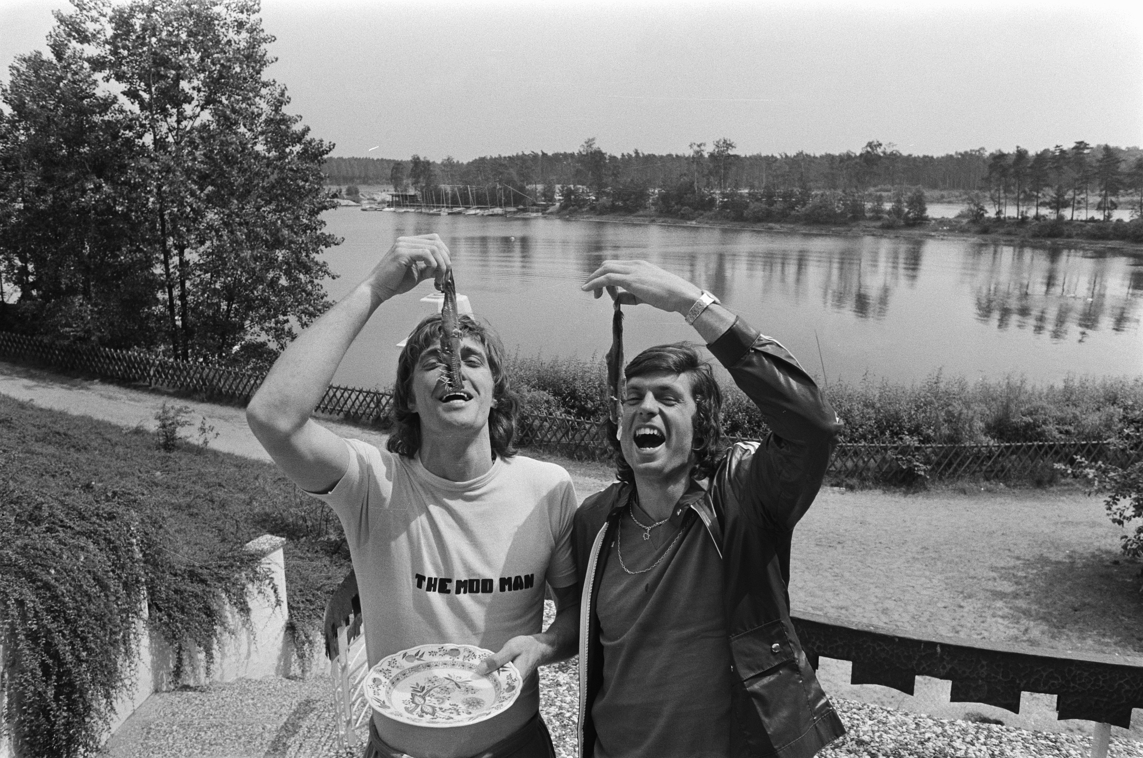 Collectie / Archief : Fotocollectie Anefo Reportage / Serie : [ onbekend ] Beschrijving : Nederlandse voetballers in WK; trainingskamp in Hiltrup; Krol en Suurbier (r) eten haring Datum : 20 juni 1974 Trefwoorden : HARINGEN, sport, trainingskampen, voetballers Persoonsnaam : Suurbier, Wim Fotograaf : Verhoeff, Bert / Anefo Auteursrechthebbende : Nationaal Archief Materiaalsoort : Negatief (zwart/wit) Nummer archiefinventaris : bekijk toegang 2.24.01.05 Bestanddeelnummer : 927-2698